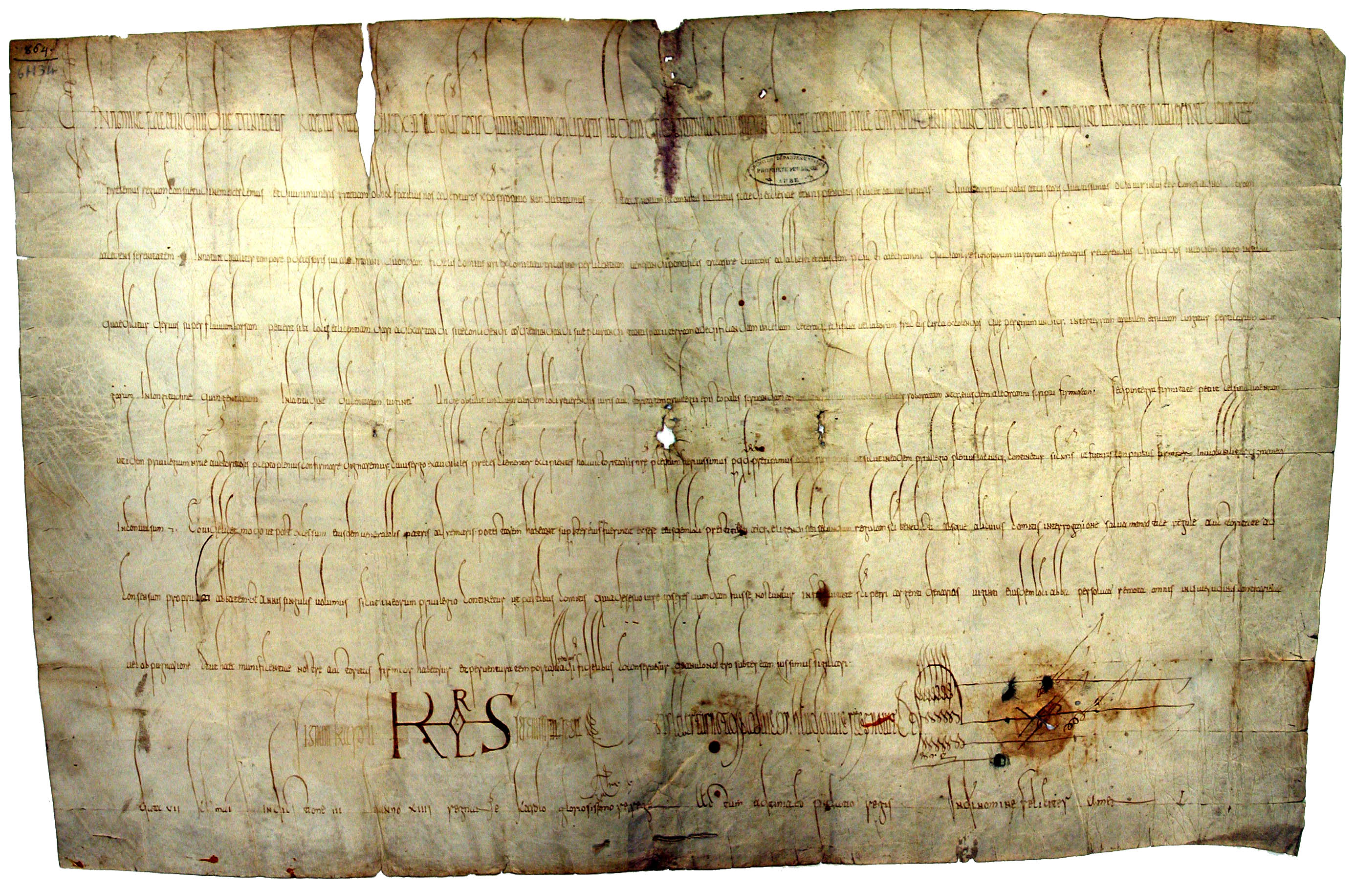 Diplôme de Charles le Chauve, daté du 25 avril 854, par lequel il confirme, à la demande de Eudes, comte de Troyes, un privilège épiscopal en faveur de la construction d’une cella (petit monastère) en lisière de la forêt du Der. Sous-série 6 H - Fonds de l’abbaye de Montiéramey. Arch. dép. Aube 6 H 34.